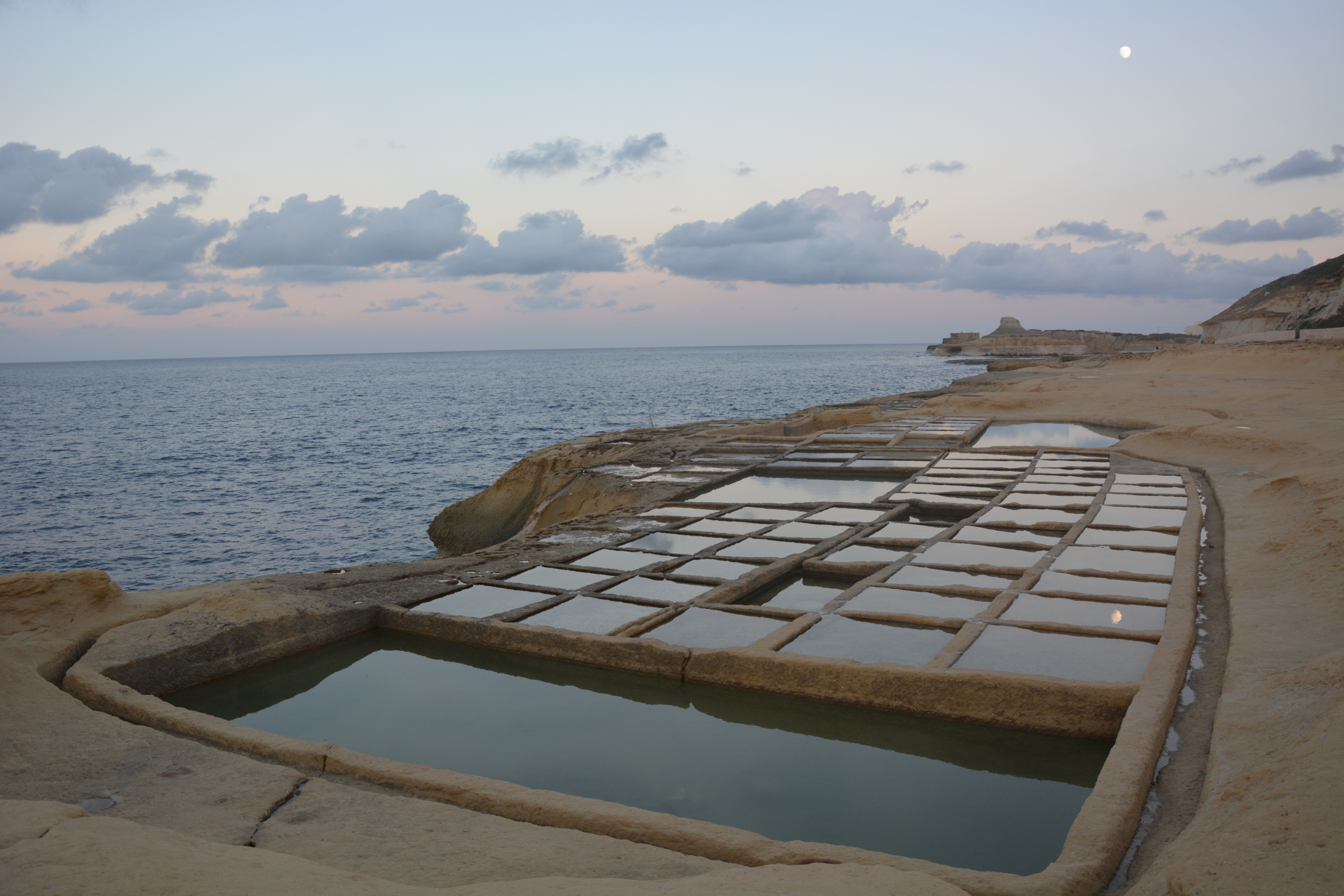 Salines de Xwejni (Marsalforn), Gozo, Malte